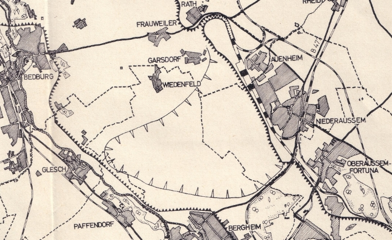 Landkarte von Frauweiler, Wiedenfeld und Garsdorf by Bürgerverein Auenheim